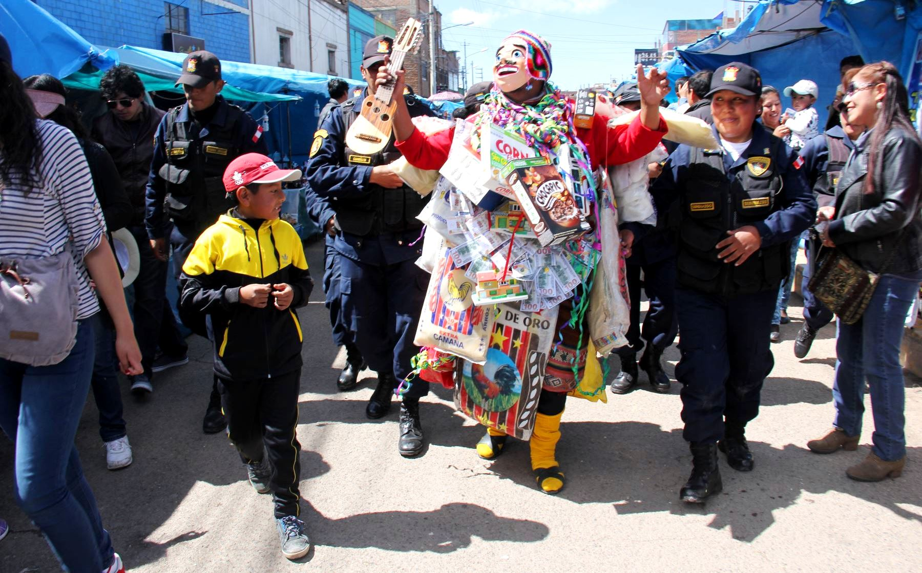 El Ekeko peruano de la Feria de Alasitas de Puno - Patrimonio Cultural de la Nacion - Perú